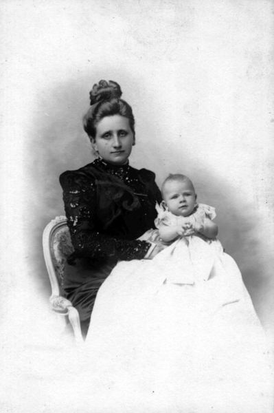 cécile cyprien-fabre 1899